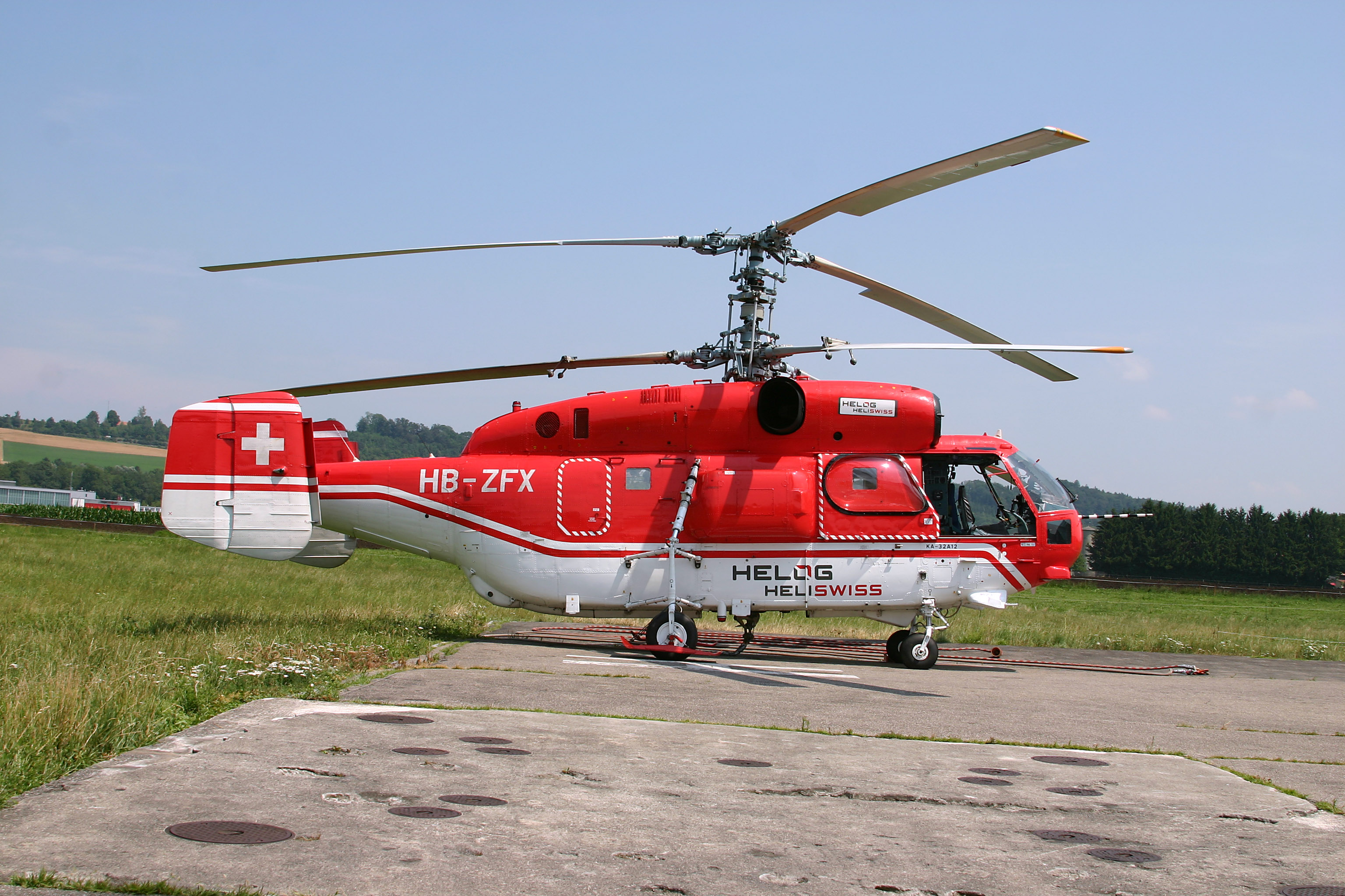 Kamow Ka-32A-12